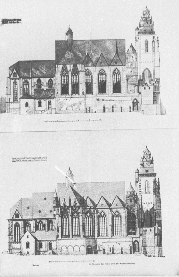 Wetzlar, ehem. Stiftskirche / Dom, Aufriß der Nordseite, vor und nach der Restaurierung 1904/1905